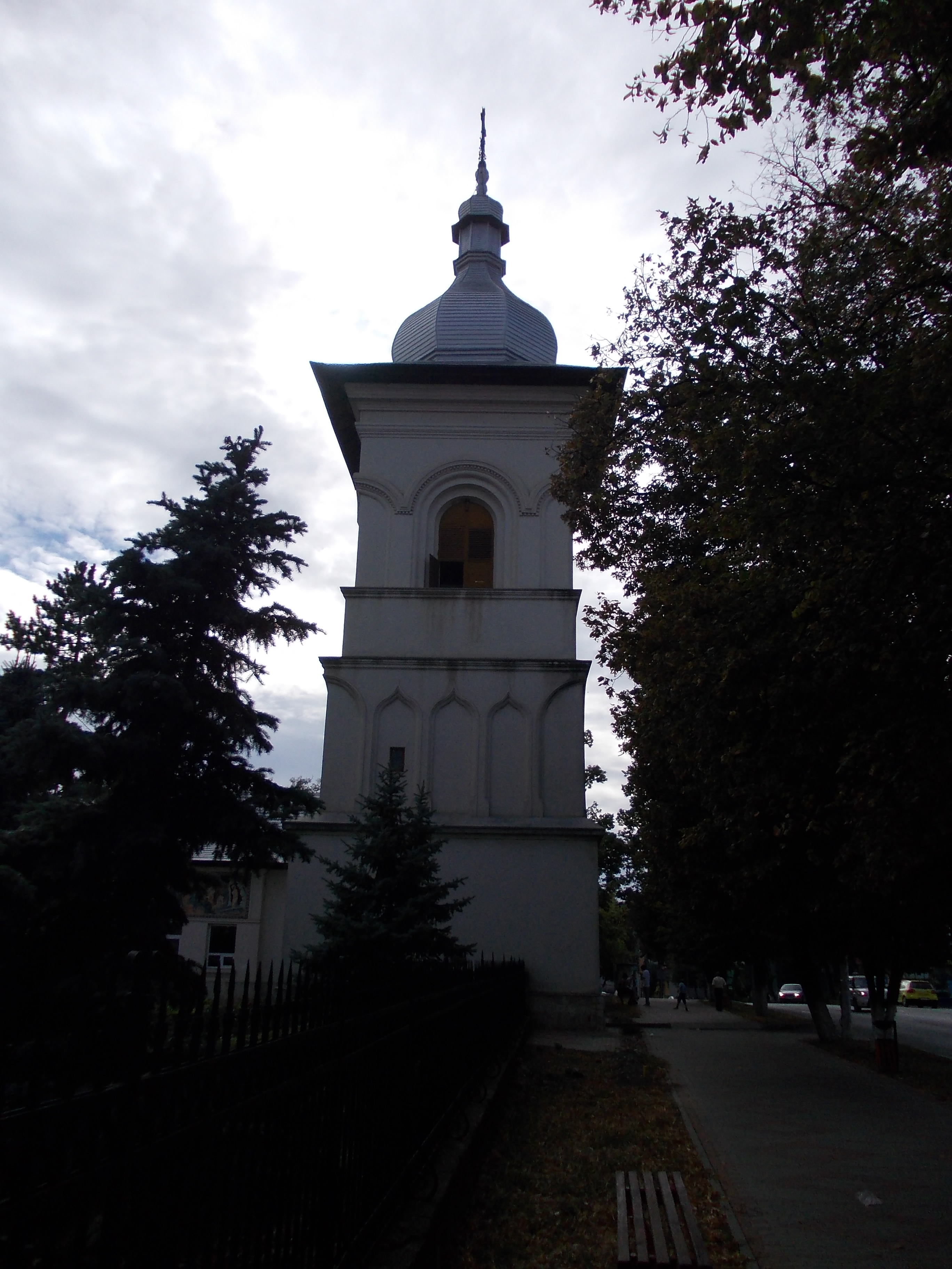 Turn clopotniță 02